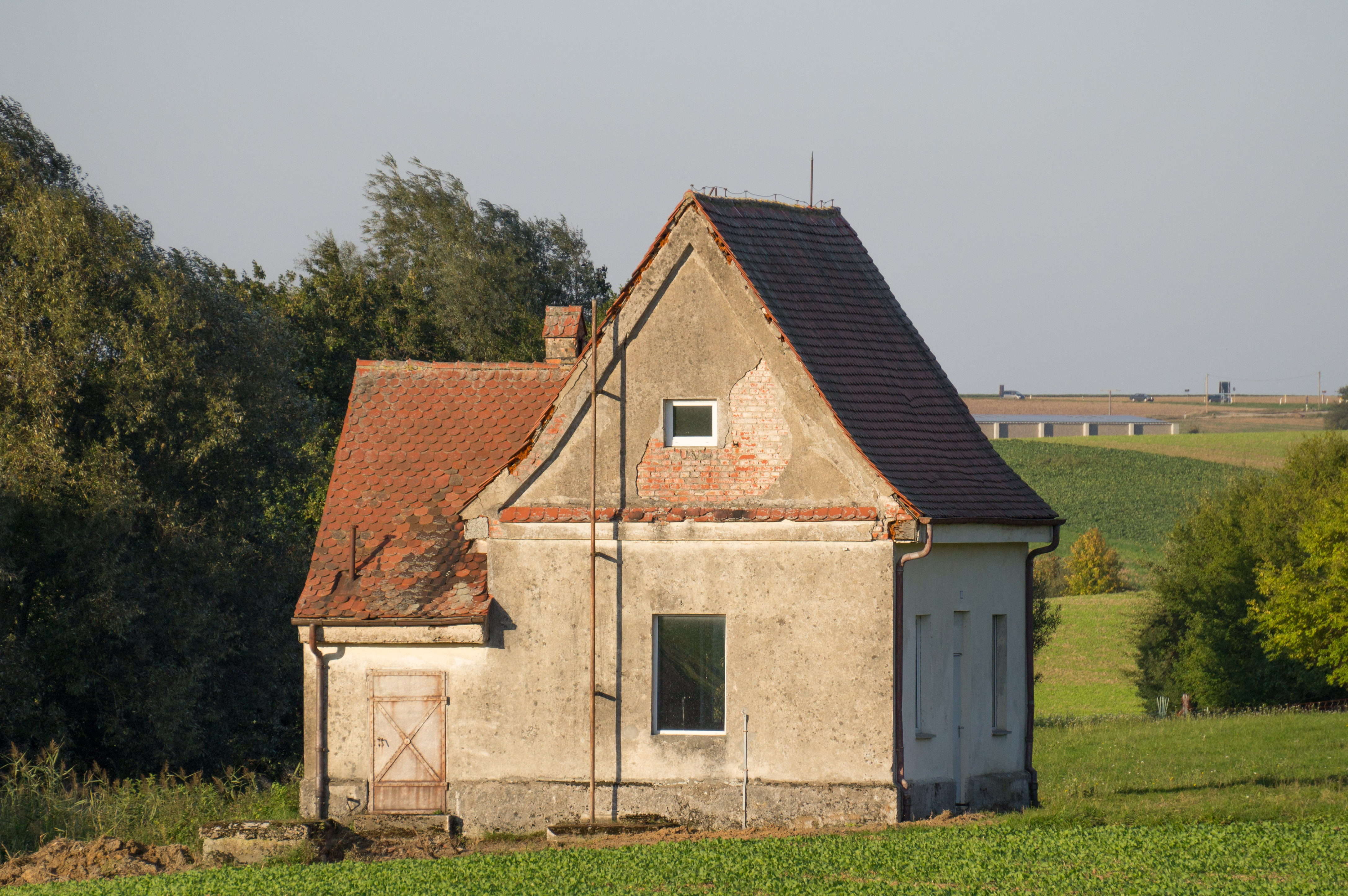 Wasserpumpenhaus - Brunnenried - Reichenberg - Albertshausen